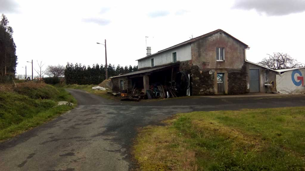 Vista de Calle das Rocas, Castro, Narón.